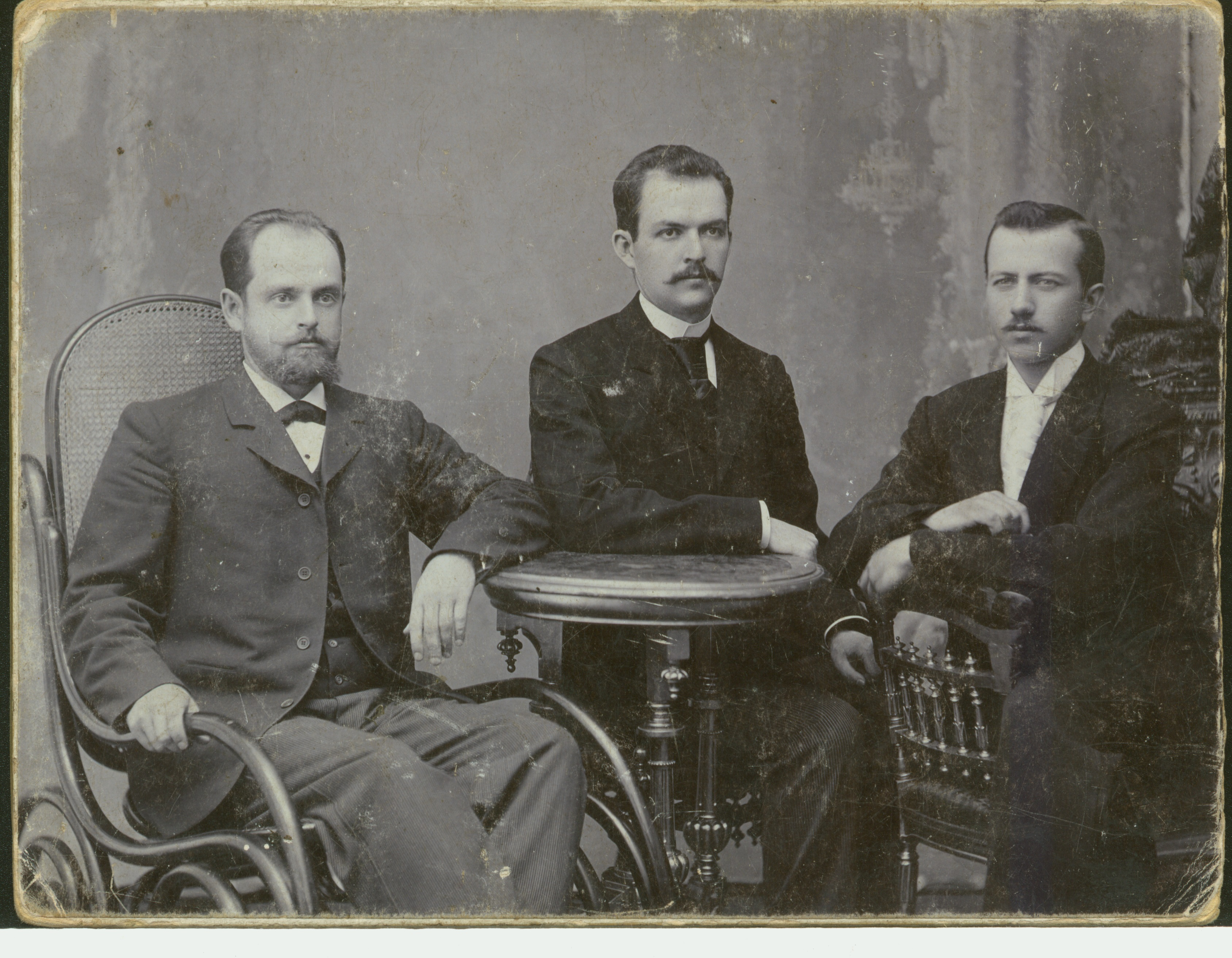 Замков Алексей Андреевич (муж В.И. Мухиной) в молодости (справа). Фото с родственниками: Буренковым Павлом Андреевичем (слева) и Чуренковым Кузьмой Васильевичем (в центре). Все трое работали в артели "Московского купеческого банка". Замков и Чуренков двоюродные братья (фото из архива Филатова Олега Владимировича).